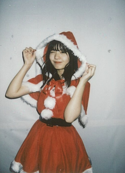 ゆな